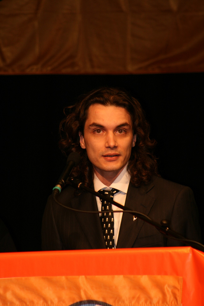 Samir Allioui (Vorsitzender von Pirate Parties International) beim Landesparteitag 2009 des Landesverbandes Bayern der Piratenpartei Deutschland im "Freiheiz" München, August 2009